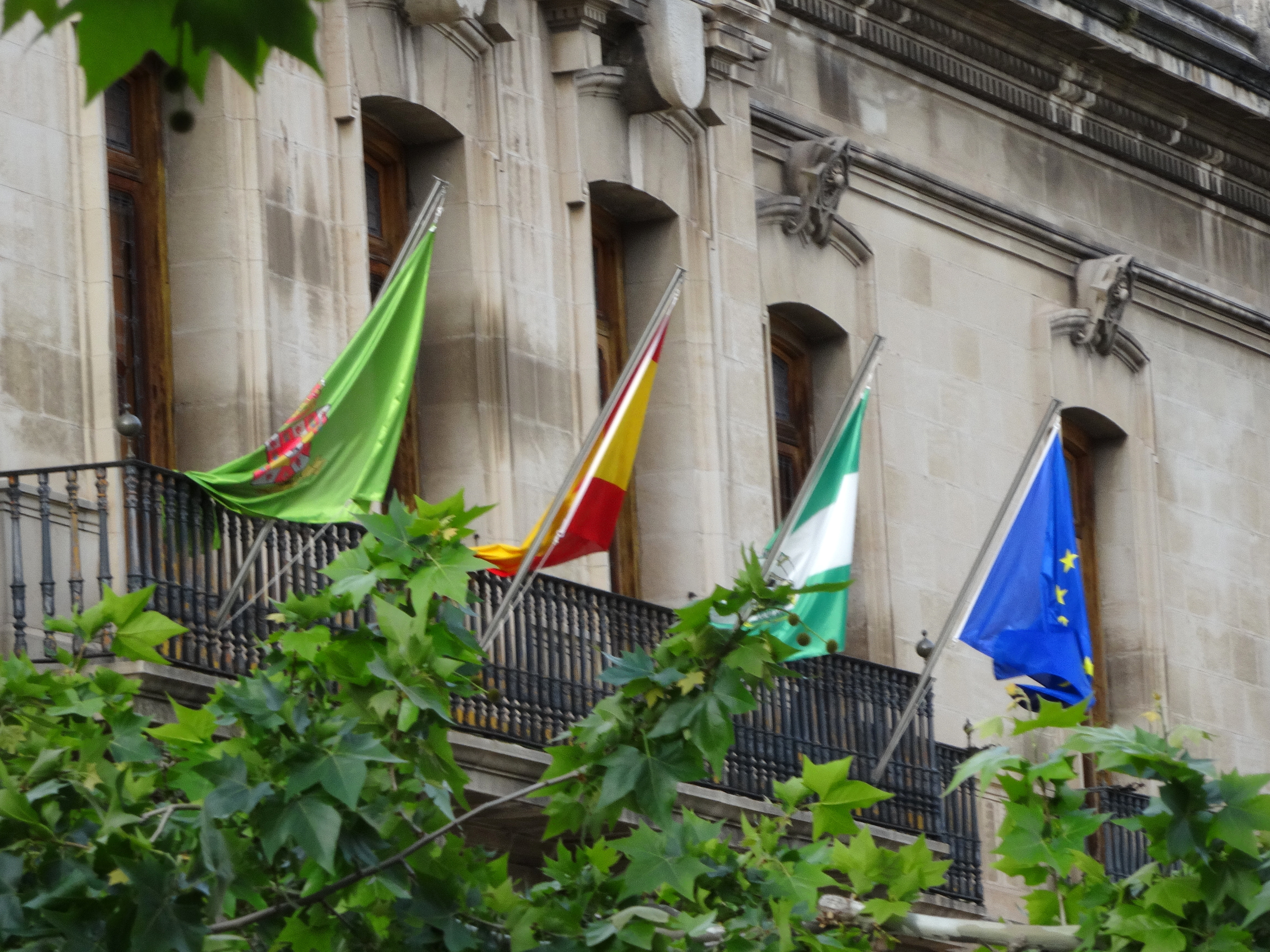 Diputación de Jaén (España).